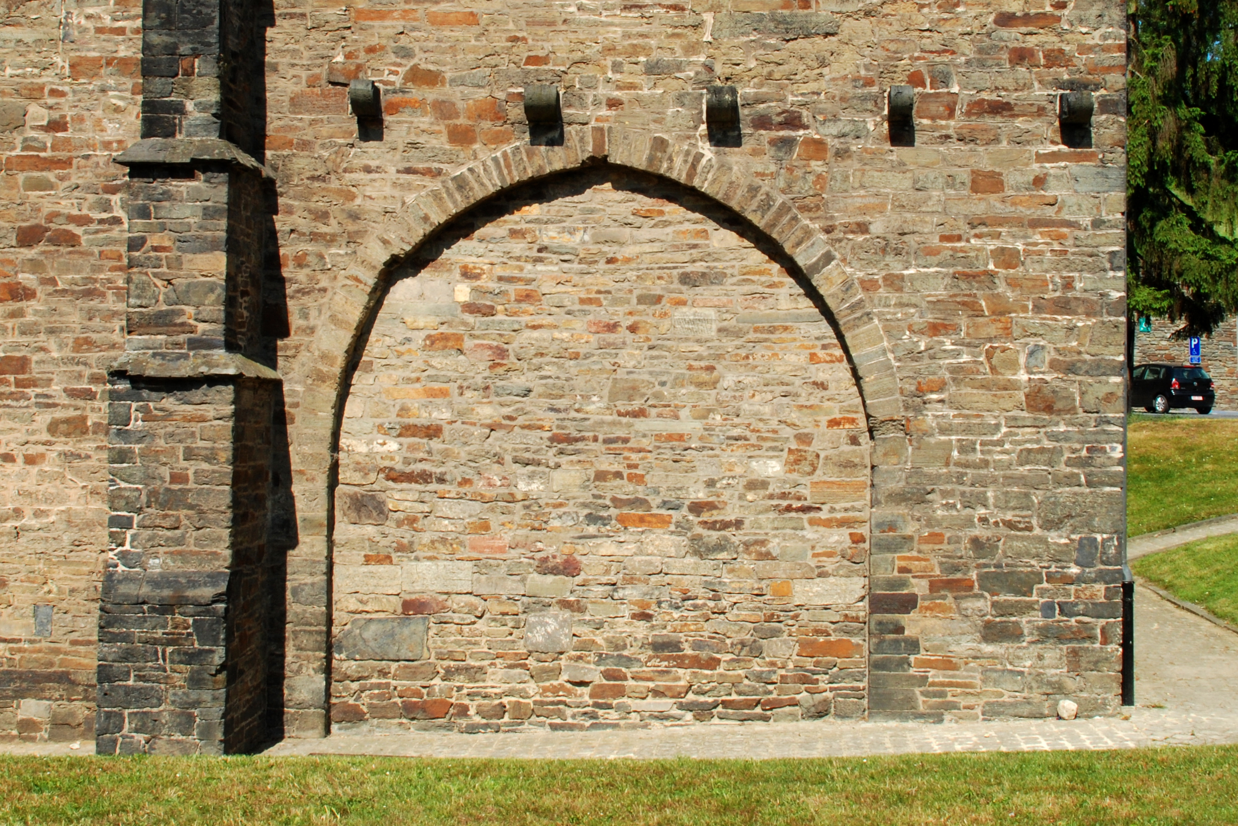 Belgique- Brabant wallon - Villers-la-Ville - ancien moulin abbatial